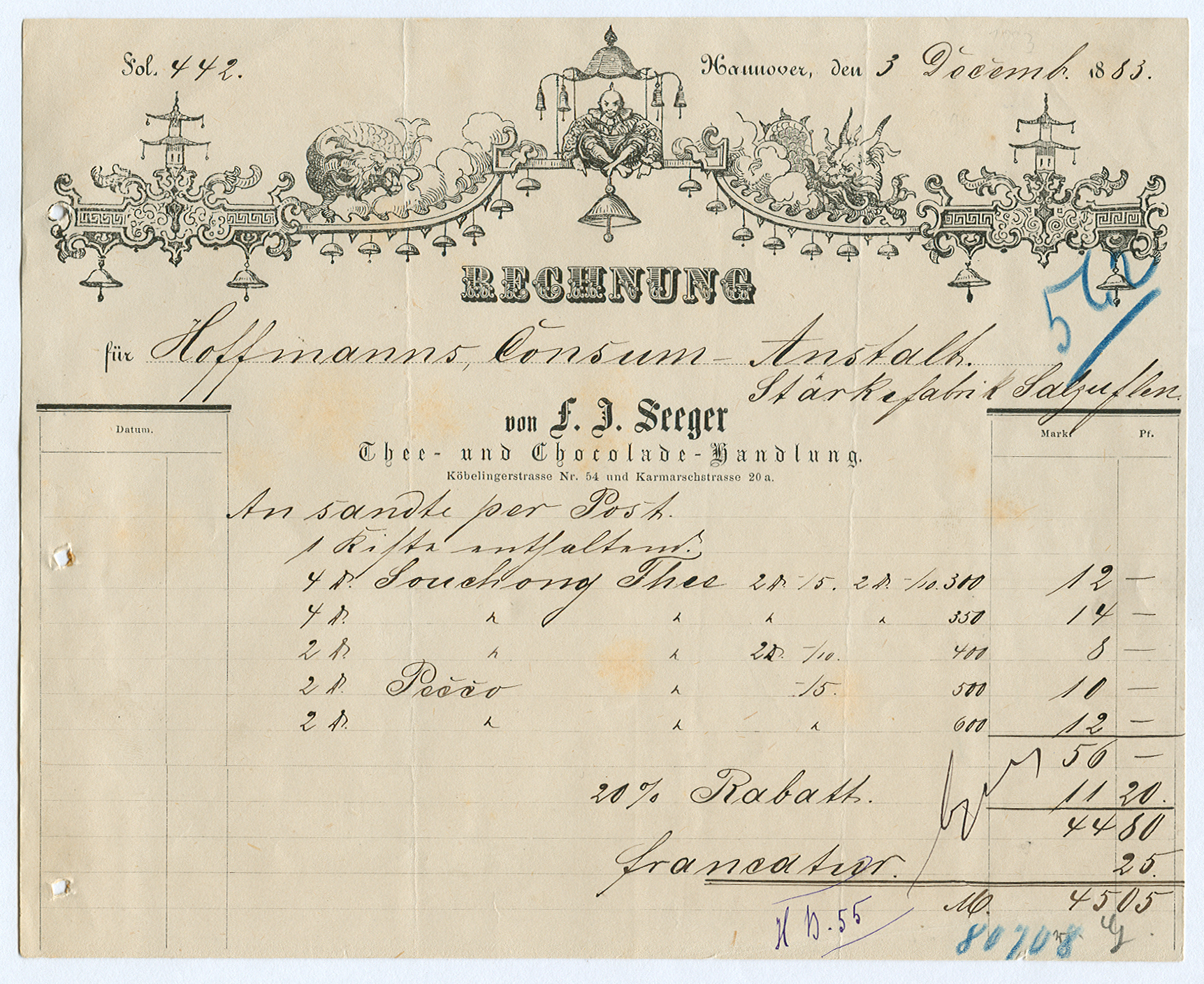 Rechnungsvordruck mit detailierten China-Anleihen, handschriftlich in Hannover datiert den 3 Decemb (18)83 und adressiert an Hoffmanns Consum-Anstalt. Stärkefabrik Salzuflen F. J. Seeger, Thee- und Chocolade-Handlung. Köbelingerstrasse Nr. 54 und Karmarschstrasse 20 a. Erst im Vergleich mit der unten aufgeführten francatur ergibt sich eine Vorstellung für den Preis der Luxuswaren wie etwa der aufgeführte Souchong Thee. Format ca. 21,2 x 17,2 cm